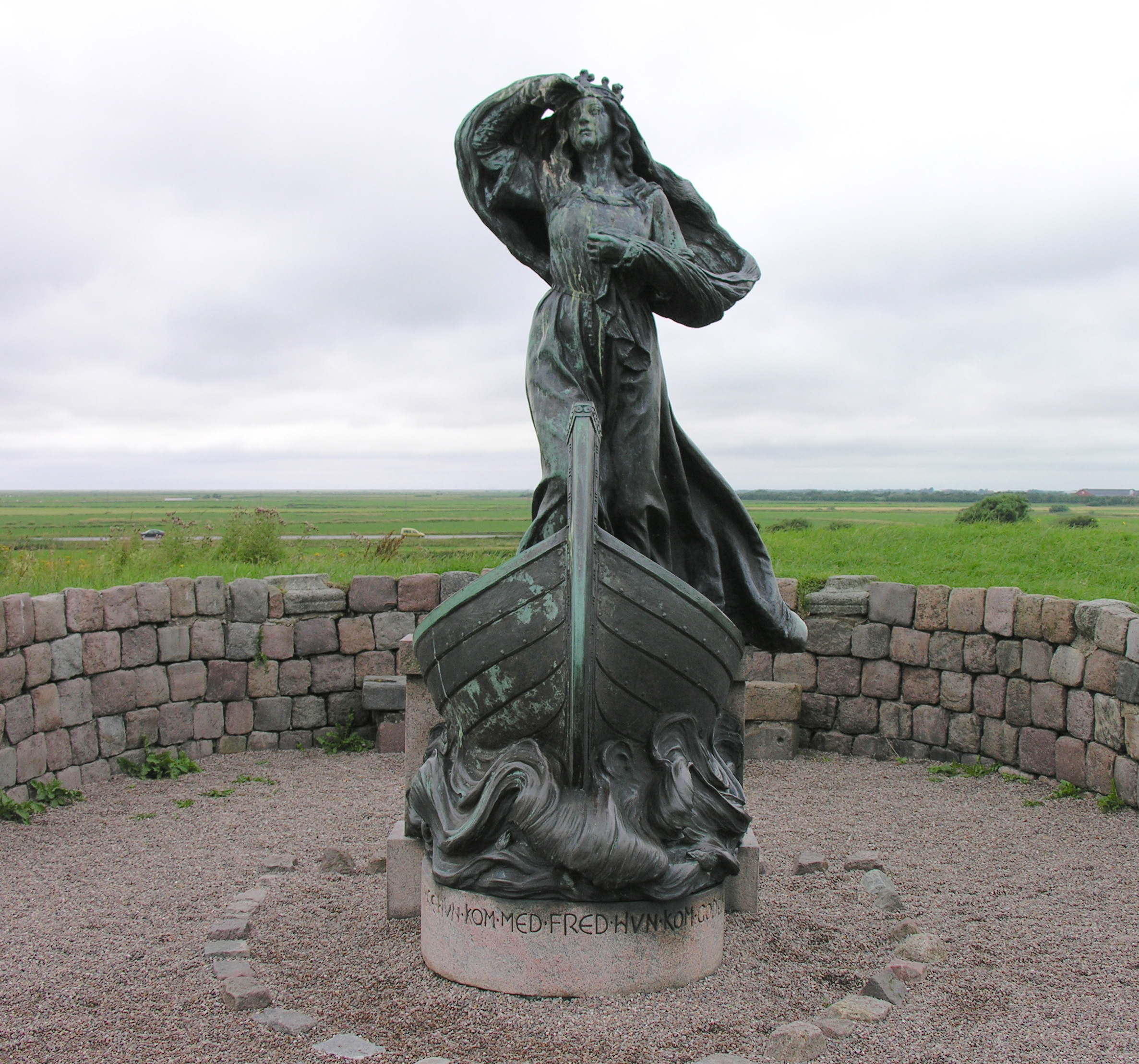 Ribe. Pomnik królowej Dagmar